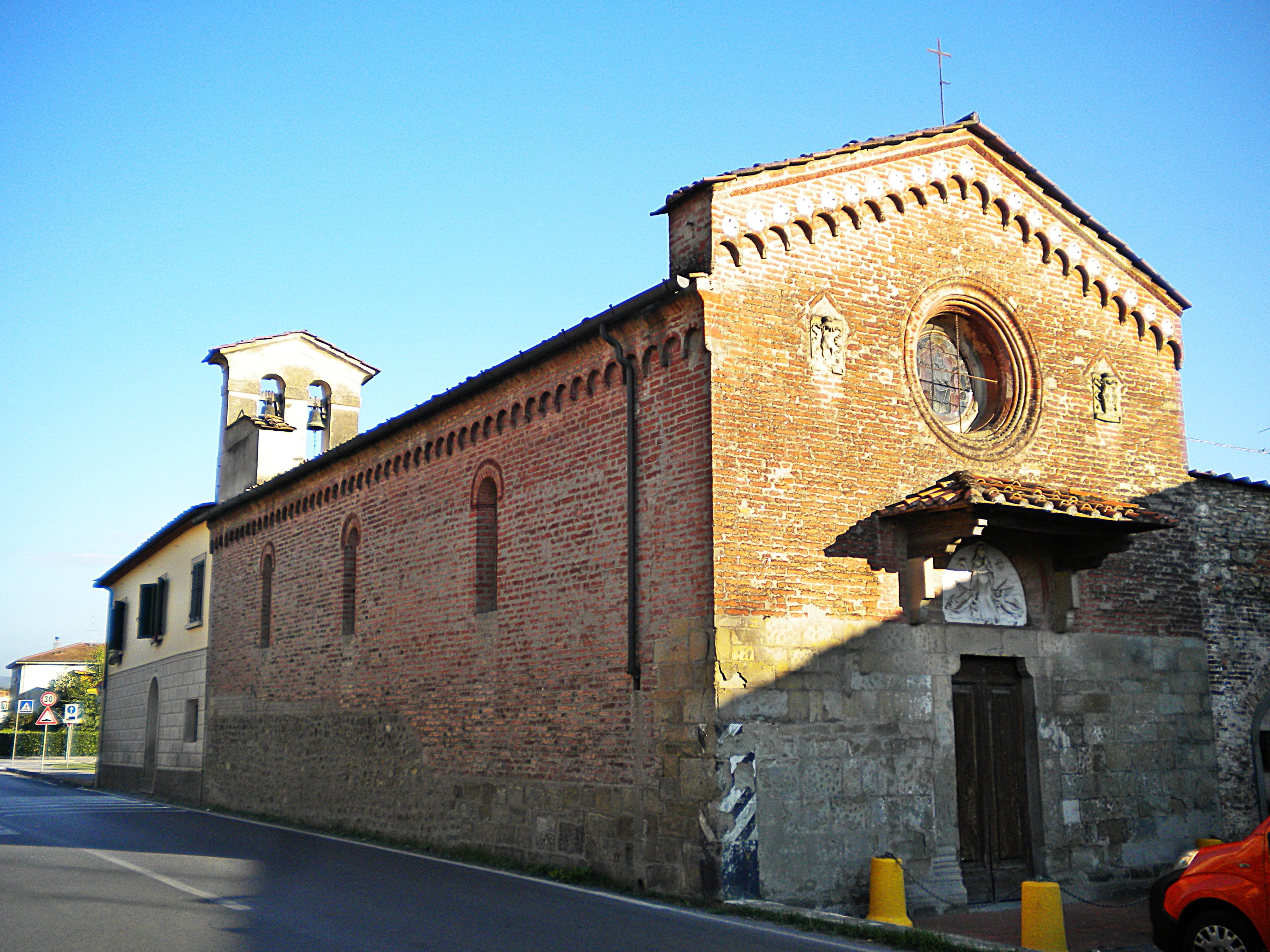 Santa Maria Assunta